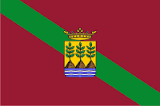 esta es la bandera actual